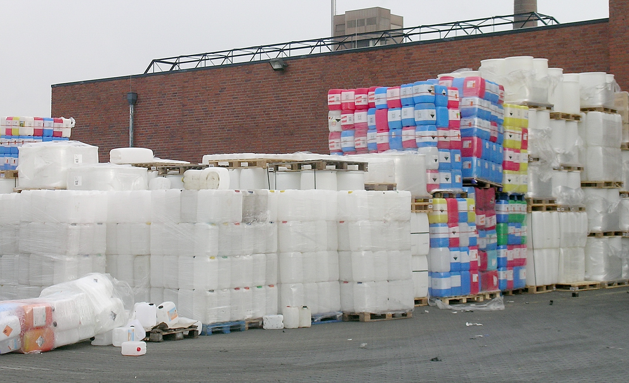 Kunststoffabfälle